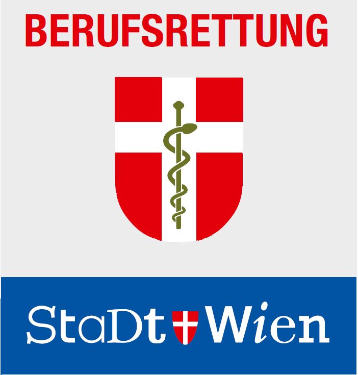 Logo der Berufsrettung Wien